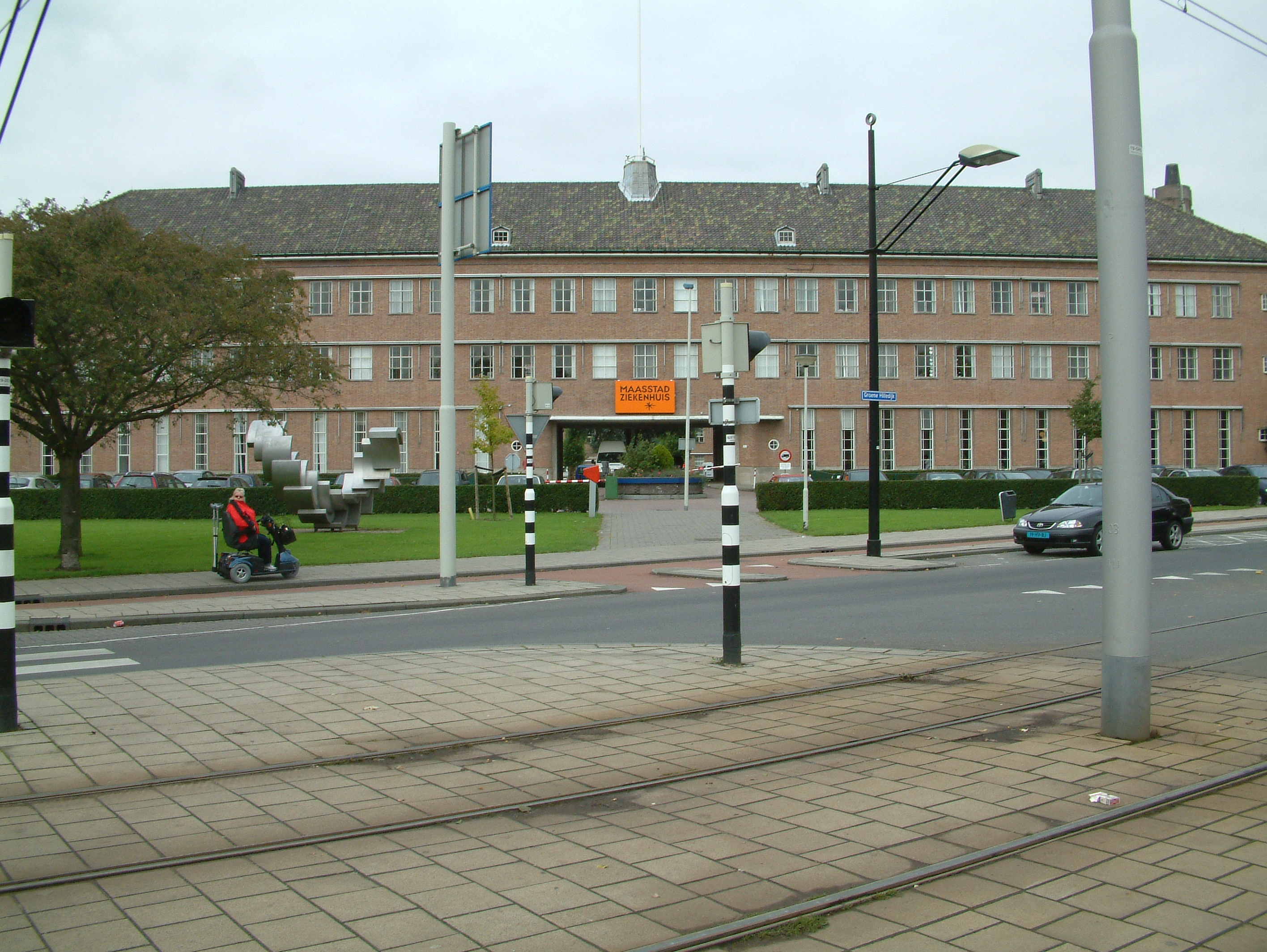 Het Maasstad Ziekenhuis, gebouwd als Zuiderziekenhuis